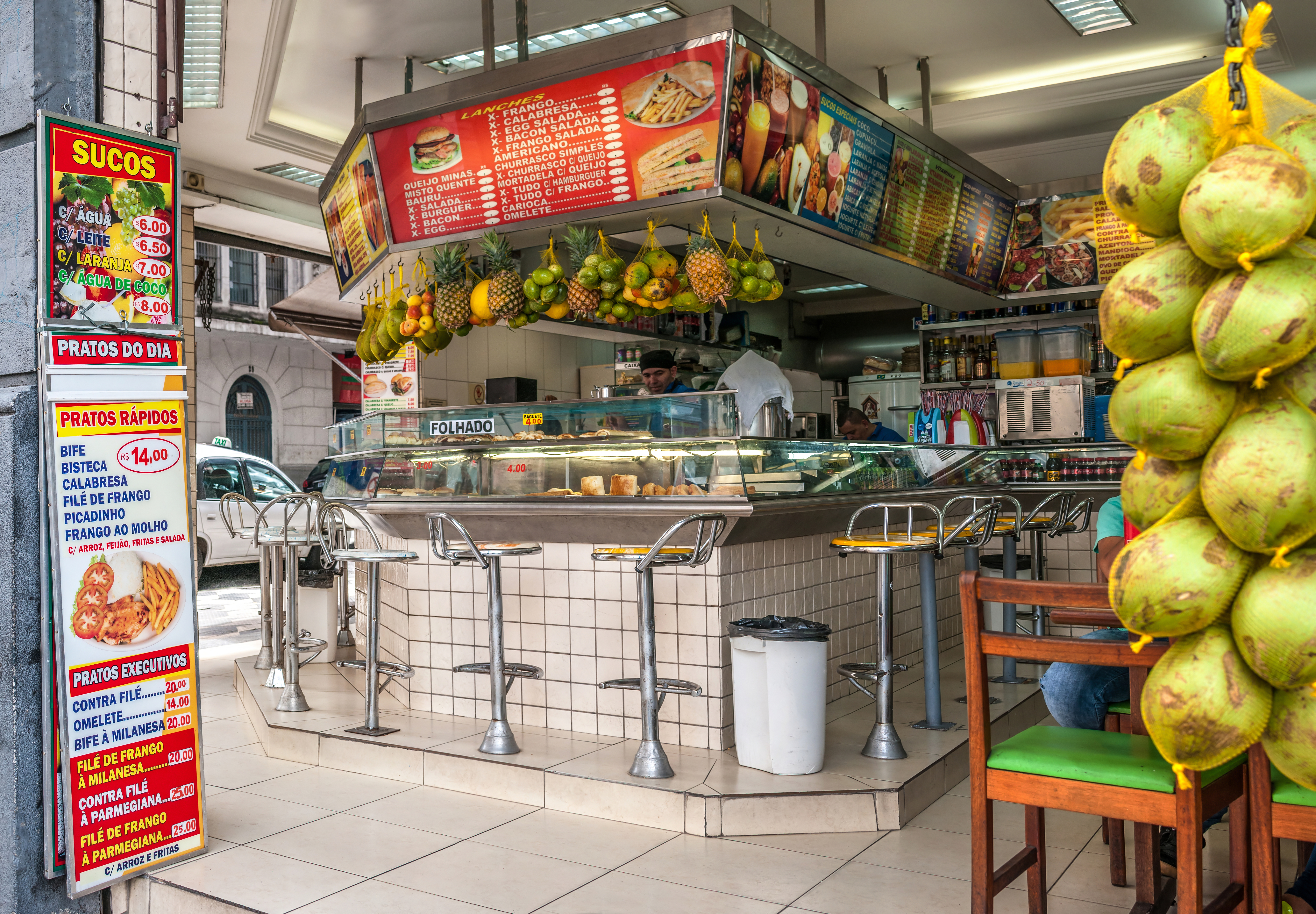 Bar Lanches Mojova. Lanchonete frente da praça da Sé, São Paulo, Brasil